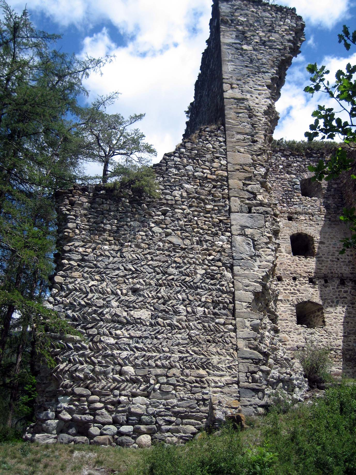 Mauerteil in Opus Spicam